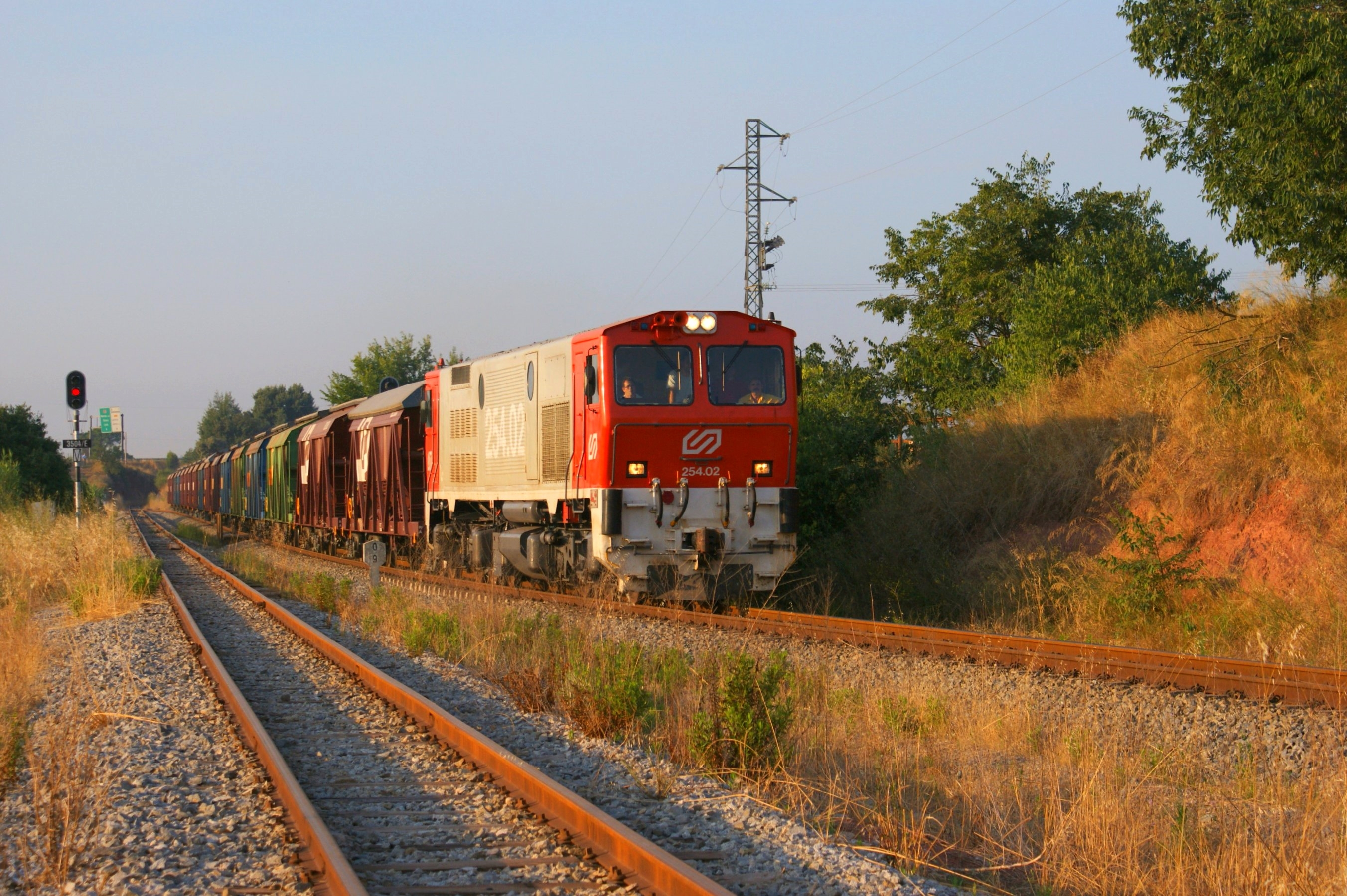 [CAT]: Potasser pujant cap Súria a primera hora del matí, a càrrec de la 254.02. [ES]: Potasero subiendo hacia Súria a primera hora de la mañana, a cargo de la 254.02.